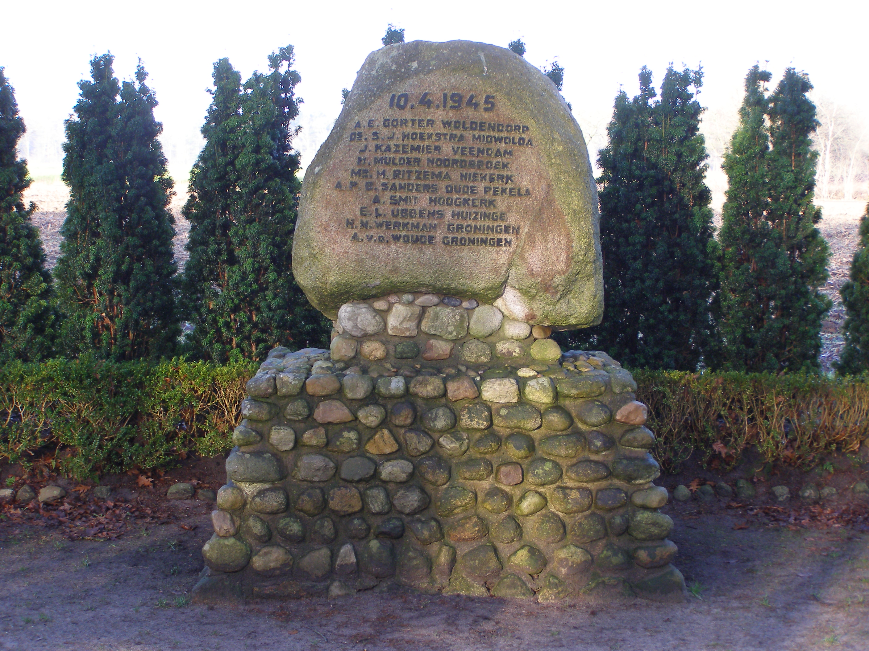 Monument (a.o. Hendrik Werkman) Allardsoog in Opsterland/The Netherlands